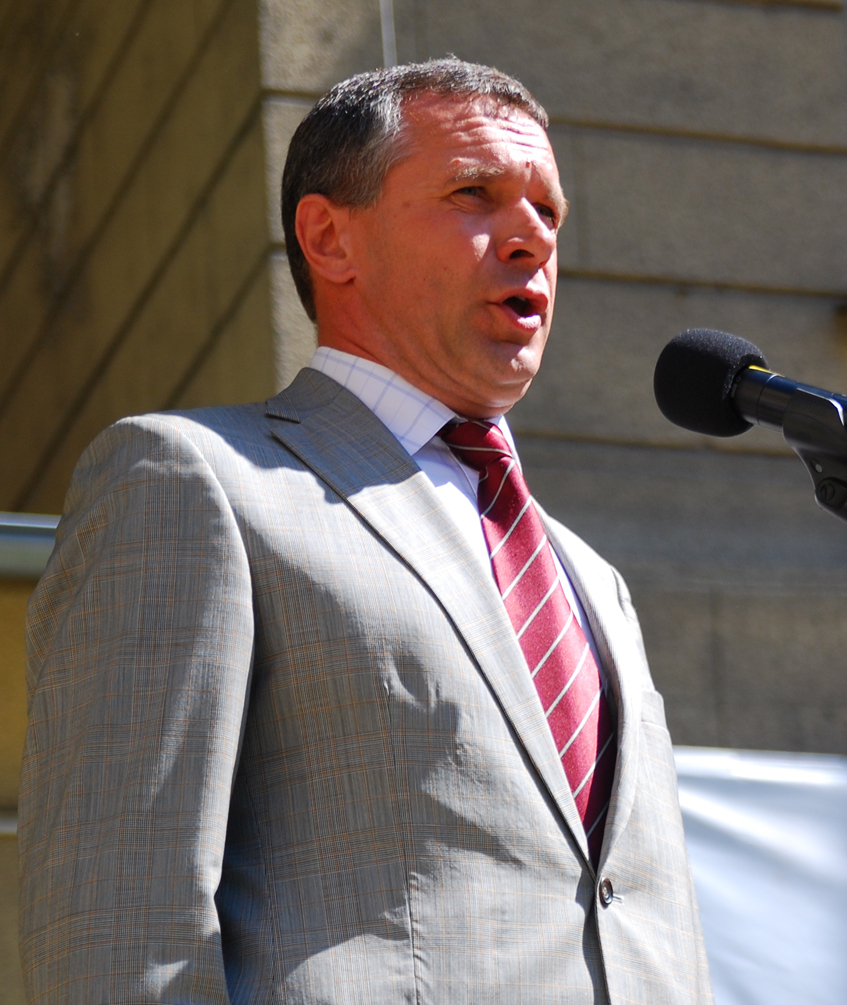 Martin Babjak